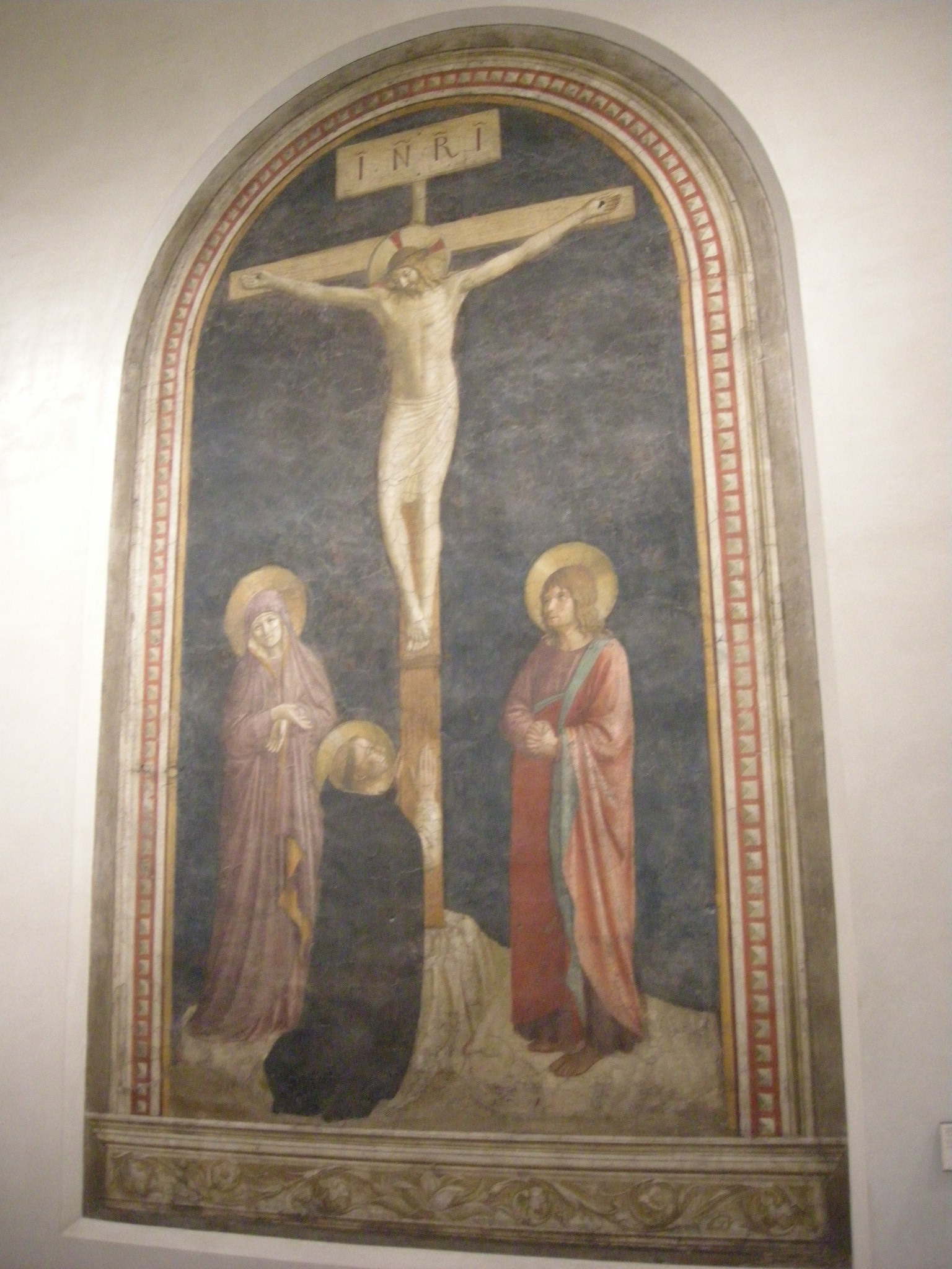 Beato angelico, calvario (1400-1445), affrescod a convento di san domenico.JPG